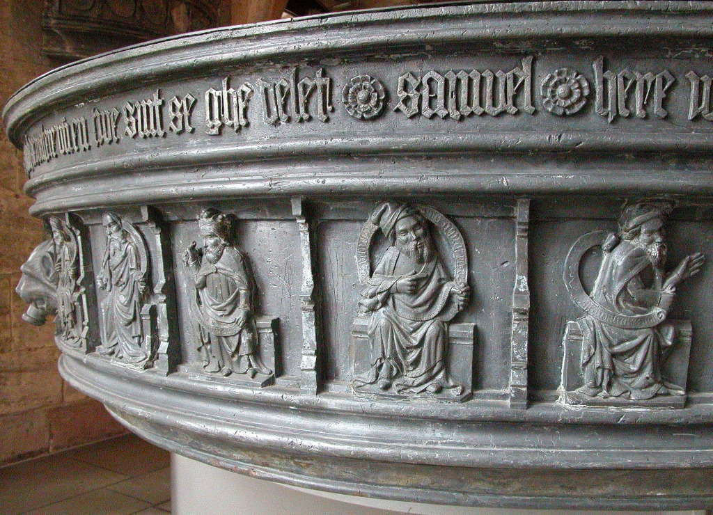 Braunschweig: Figurenrand auf der unterste Originalschale des Marienbrunnens im Städtischen Museum im Altstadtrathaus. Braunschweig, Germany: Rim with figurines on the lowest original bassin of St. Mary’s Fountain in the Municipal Museum in the Old Town Town hall.